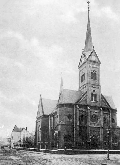 im Zweiten Weltkrieg zerstörte St.-Ludgeruskirche in Essen-Rüttenscheid